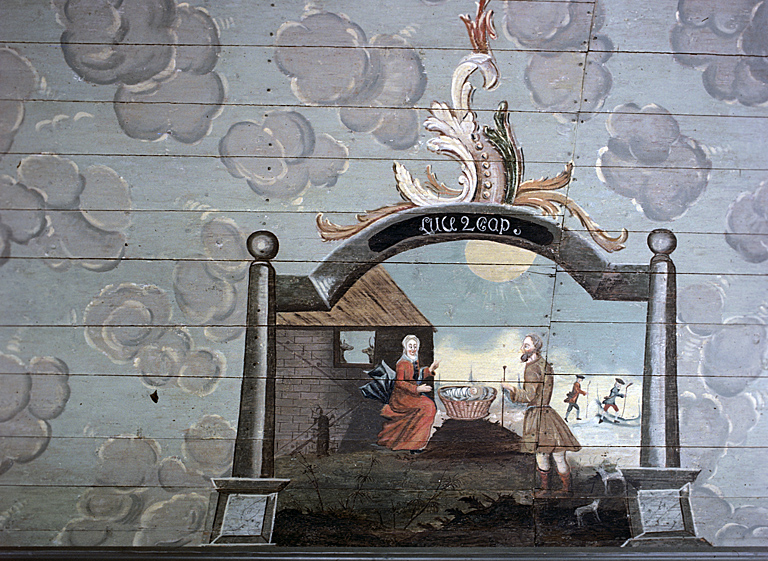 Detalj av målning, Jesu födelse. Motiv: Gällinge kyrka Nyckelord: Riksintressen Kategori: (03) Målningar på trä, (02) Interiörer, detaljerDetalj av målning, Jesu födelse.